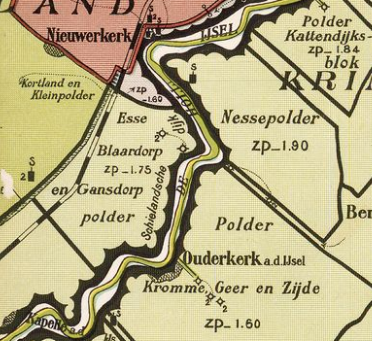 Esse_Blaardorp_en_Gansdorp_polder